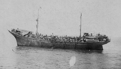 אוניית המעפילים דב הוז